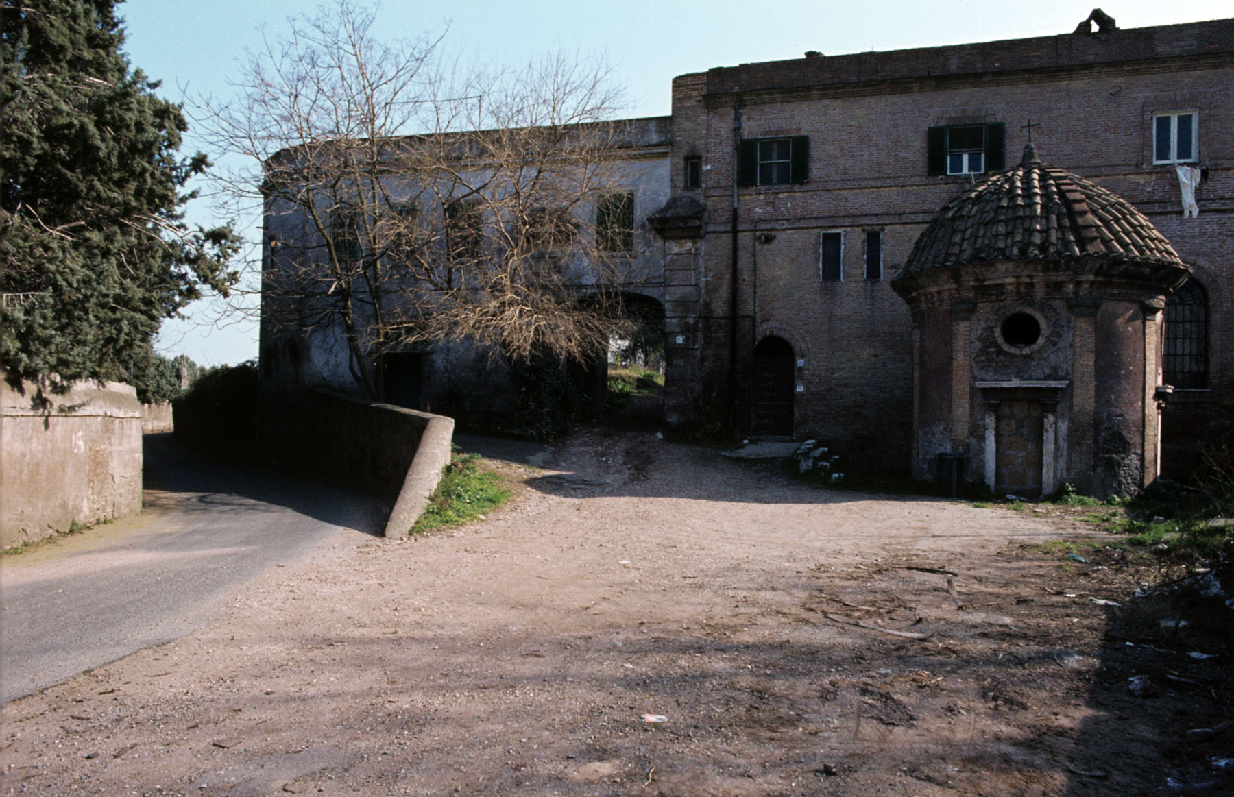 Edicola del cardinal Pole e inizio della via della Caffarella